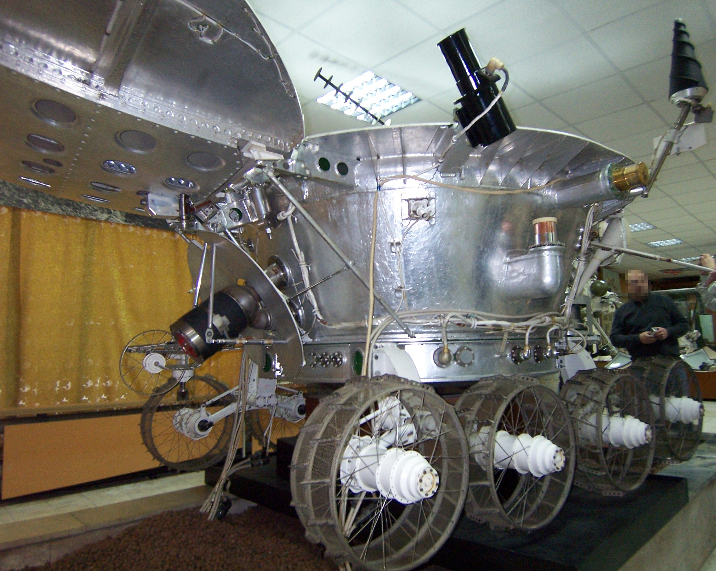 Луноход-3. Вид сбоку. Музей НПО имени Лавочкина. Город Химки, Московская область.